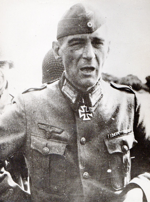 Kapitänleutnant Richard Seuss, commandant la garnison de la Kriegsmarine de Cézembre peu après se rédition le 2 septembre 1944